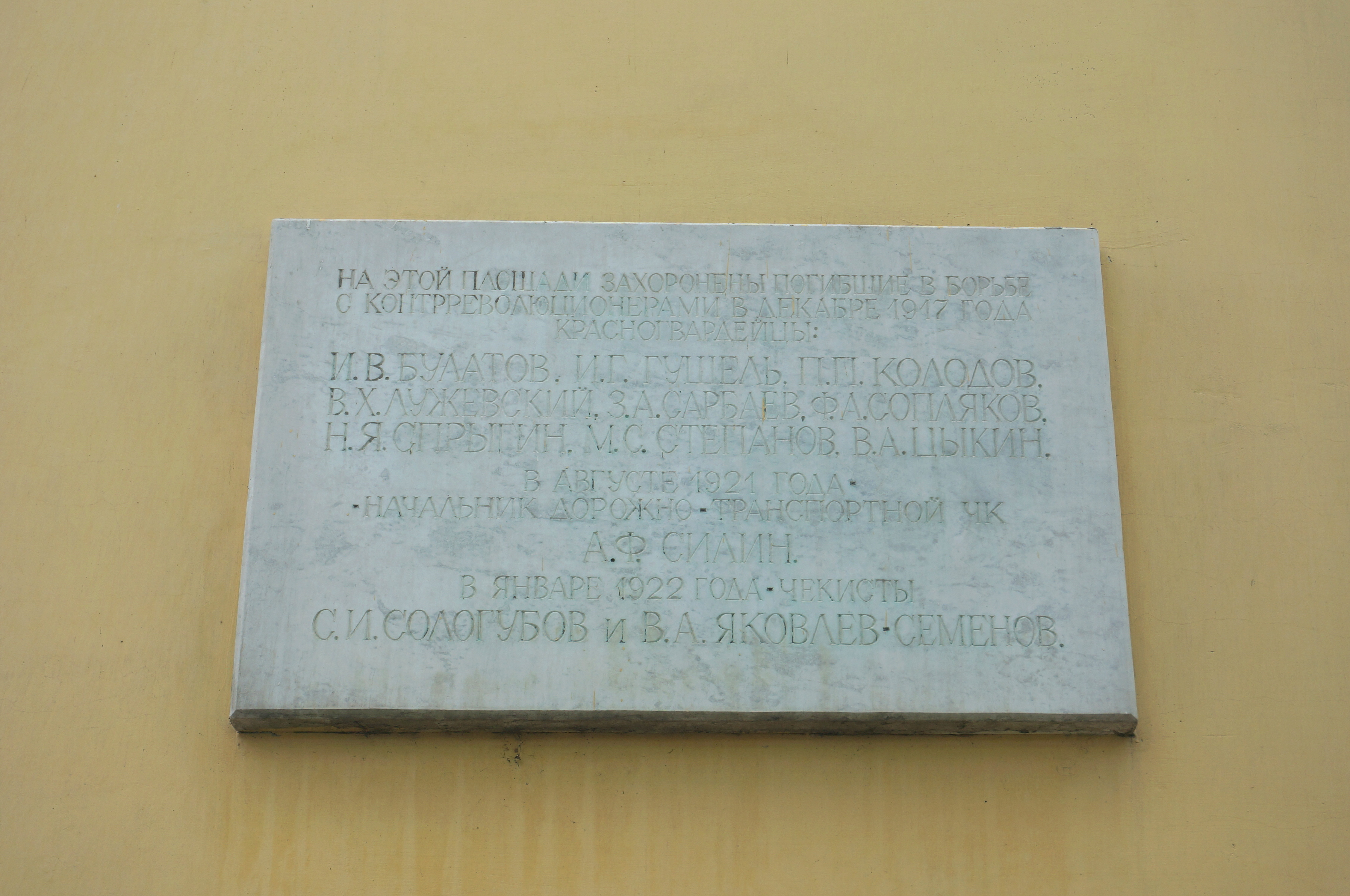 Мемориальная табличка на доме №5 по улице Шостаковича (Рабочей) в Самаре, о том, что на площади Чапаева похоронены красноармейцы и чекисты